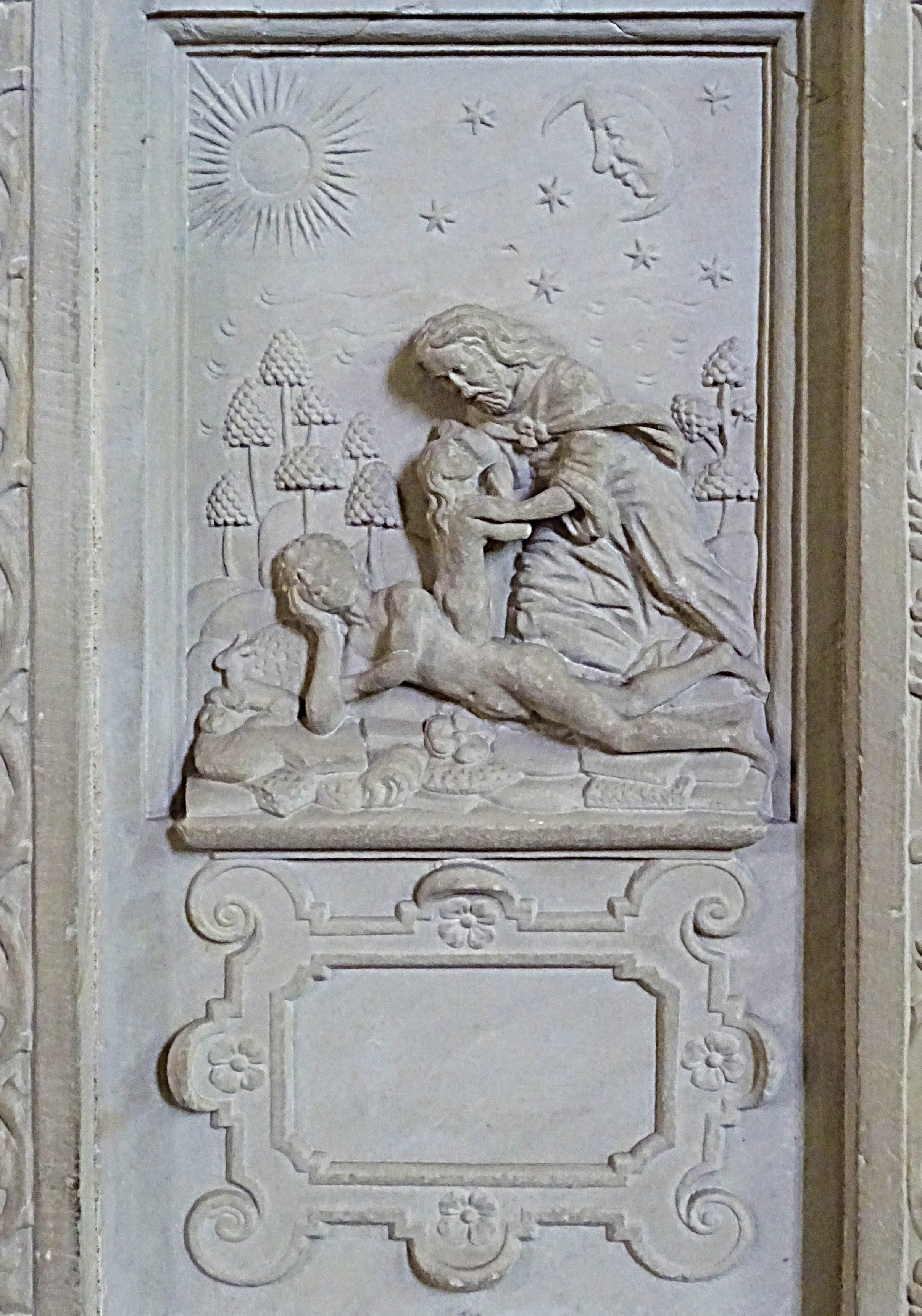 Steinbilderbibel in der St. Annenkirche (Eisleben), 04/29, Erschaffung Evas